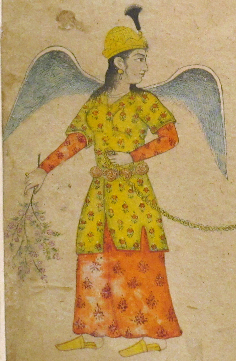 Pari (ou Peri) conduisant un animal composite d'inspiration persane. Peinture Rajput. XIXe siècle ? Bhopal, Archaeological Museum